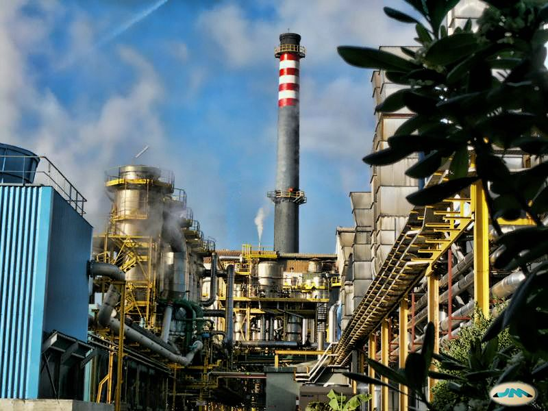 Ence, Lourizán, Pontevedra, Galiza. Evaporadores e Secapastas